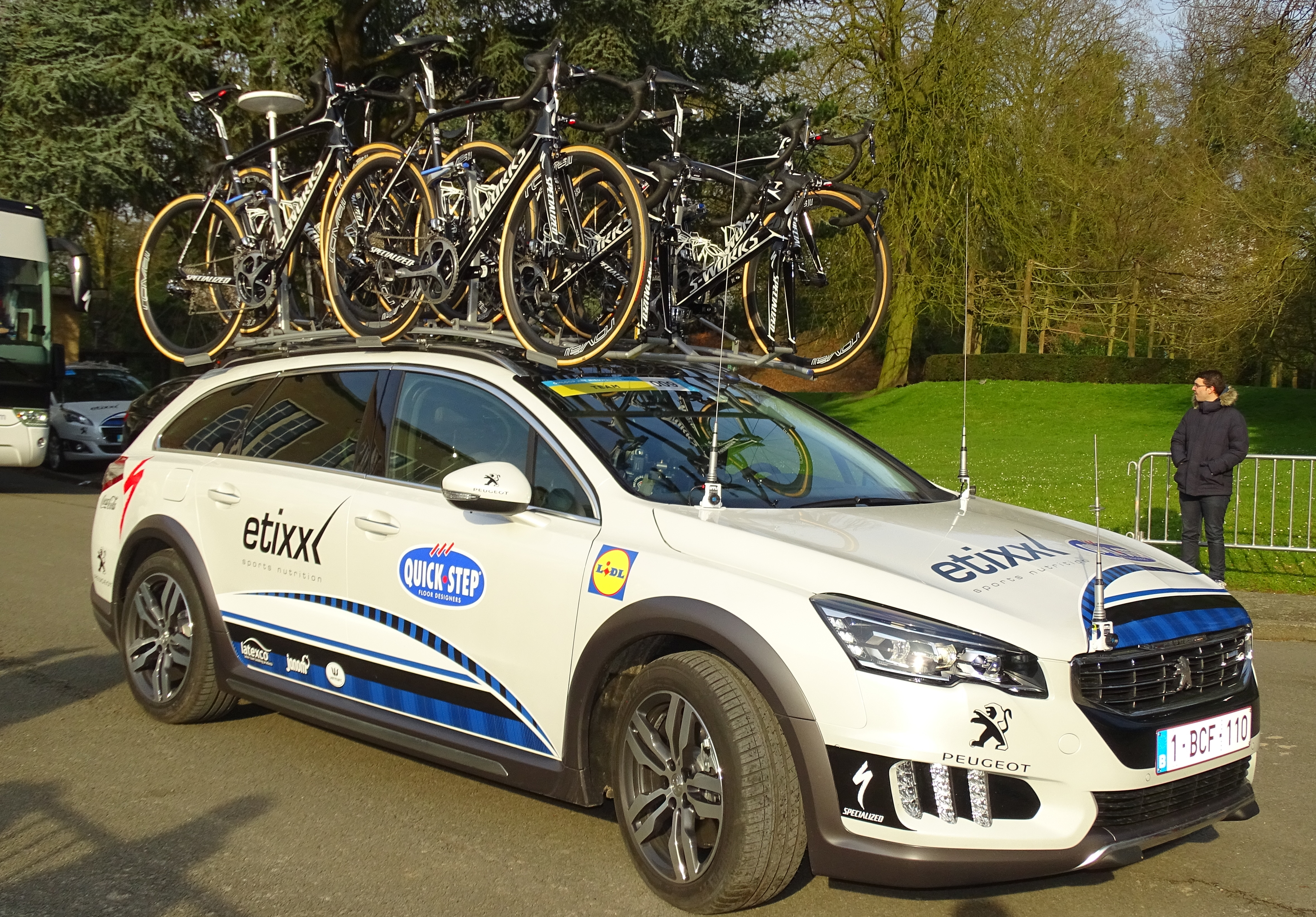 Reportage réalisé le samedi 27 février à l'occasion du départ et de l'arrivée du Circuit Het Nieuwsblad 2016 et de l'arrivée du Circuit Het Nieuwsblad féminin 2016 à Gand, Belgique.